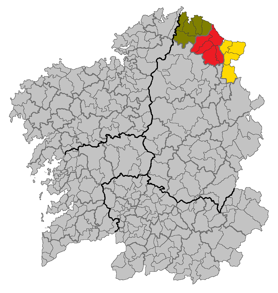 Mapa de la comarca de la Mariña de Lugo